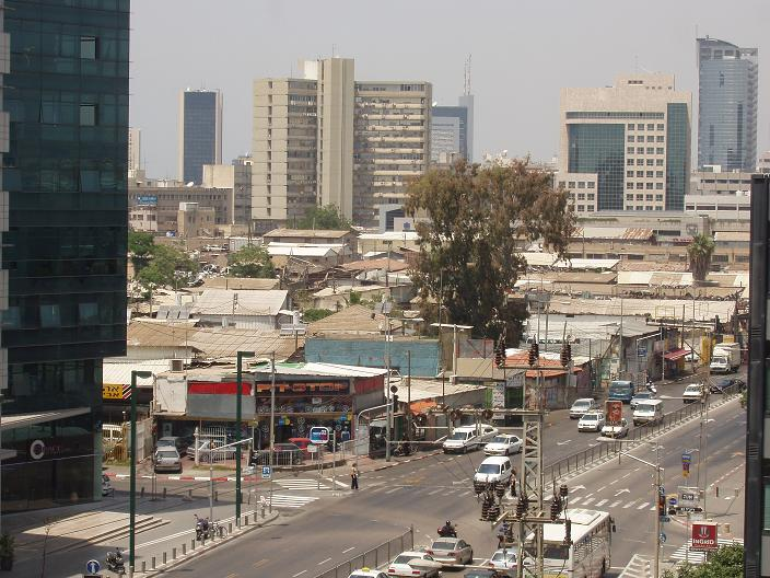 תל אביב - רחוב המסגר. צילם דוד שי